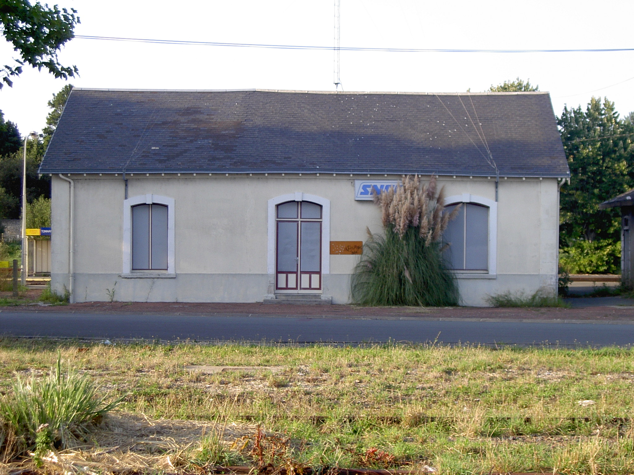 Le bâtiment voyageurs SNCF et l'entrée de la Gare de Tonnay-Charente en 2004